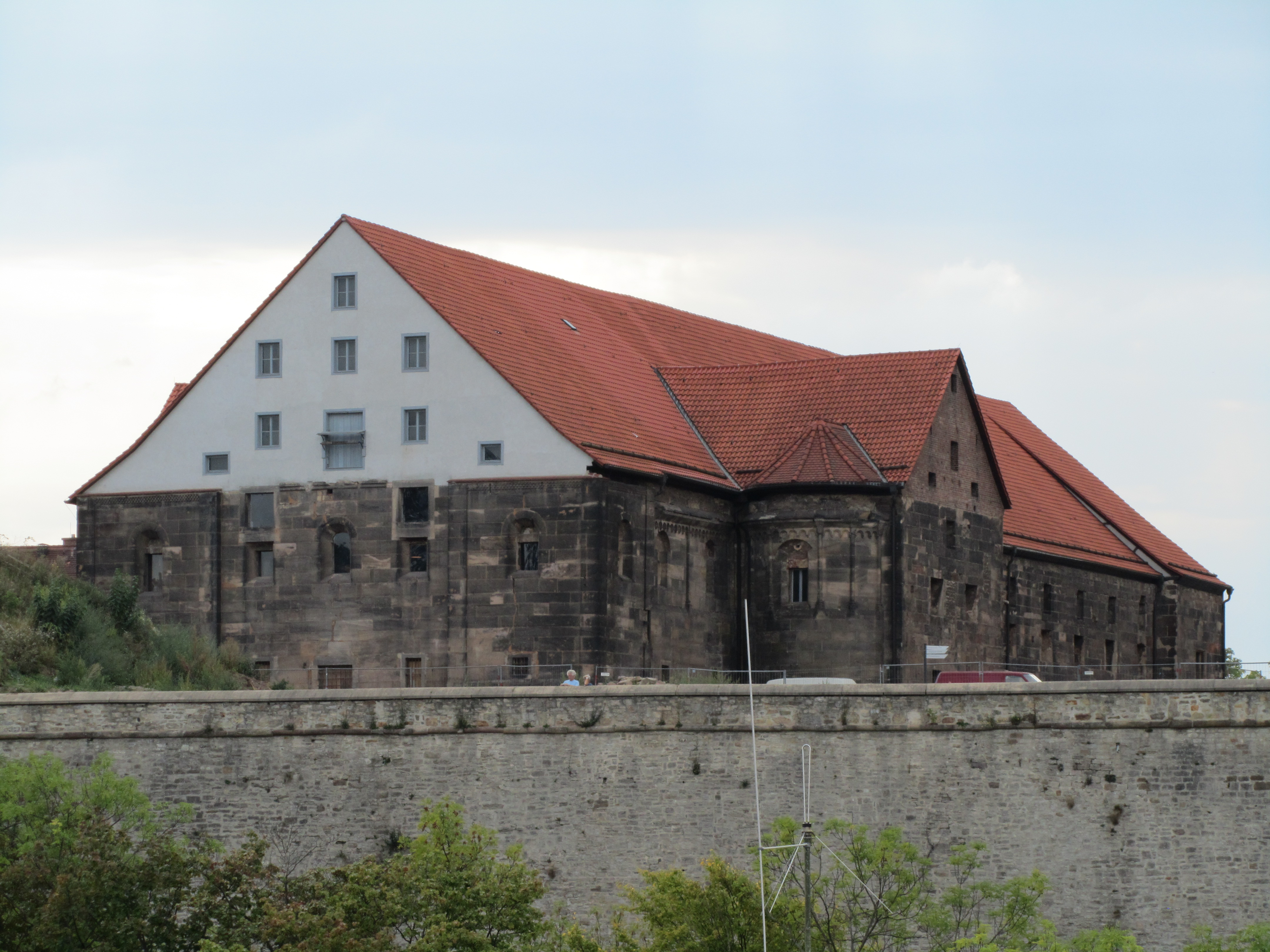 Die Peterskirche in Erfurt vom Turm der Andreaskirche aus gesehen.